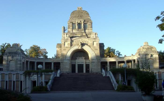 GNU-FDL Krematorium Stuttgart 2004- von Benutzer:Enslin selbst fotografiert 8.9.2004 Kategorie:GFDL-Bild :Kategorie:Stuttgart